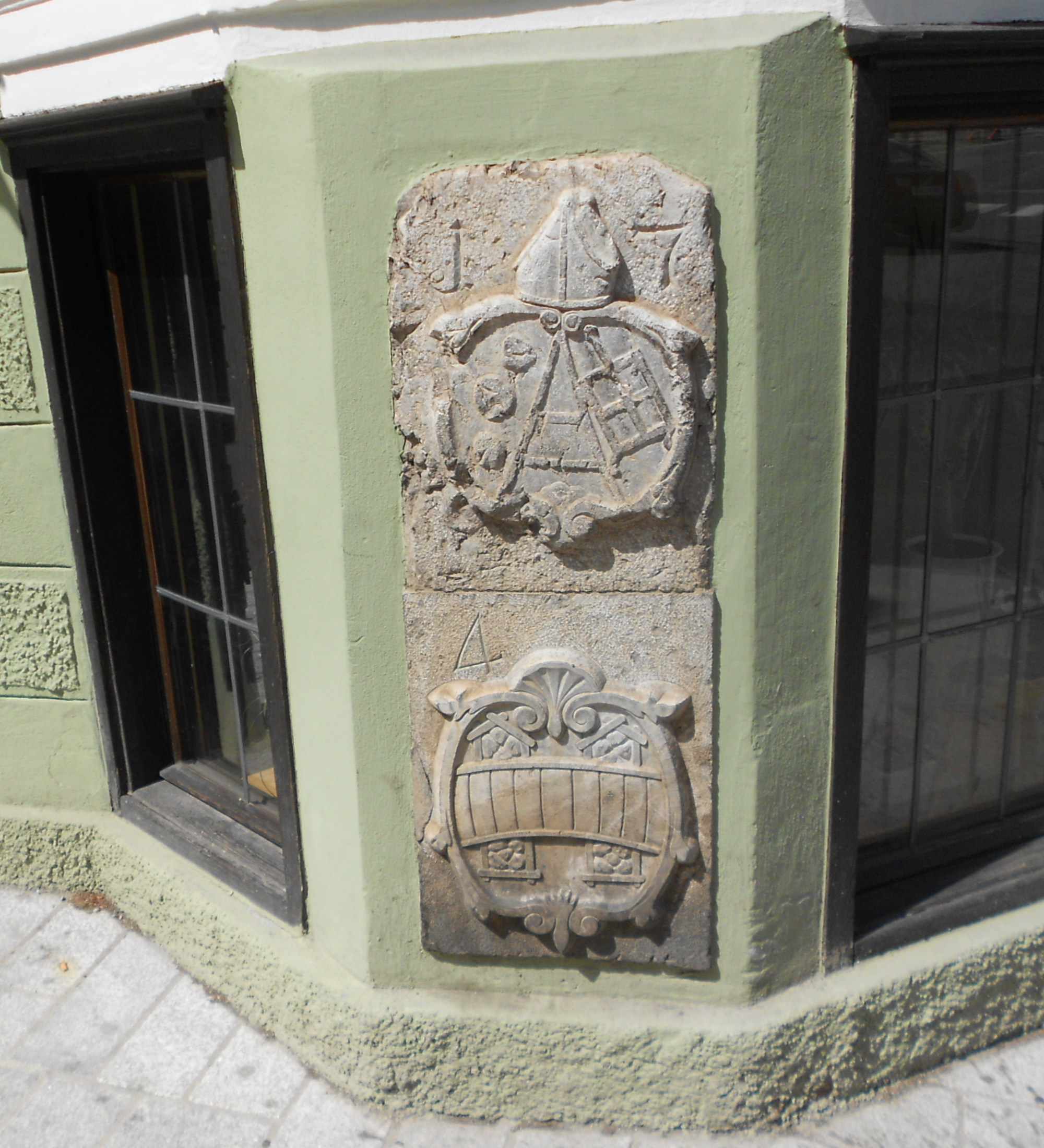 Grenzstein der ehem. Gemeinde Wilten und Innsbruck am Gasthof Krone